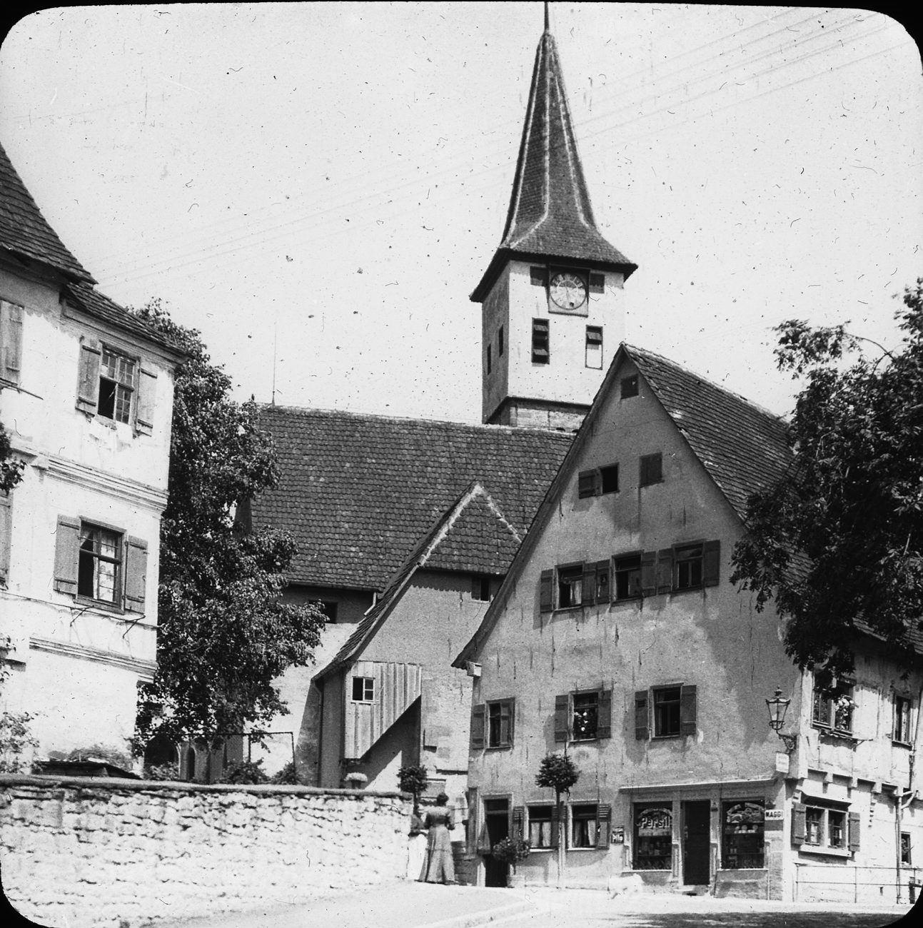 SKC3075 St. Urbanskirche, Schwäbische Hall, 1911. Photo: Sigurd Curman